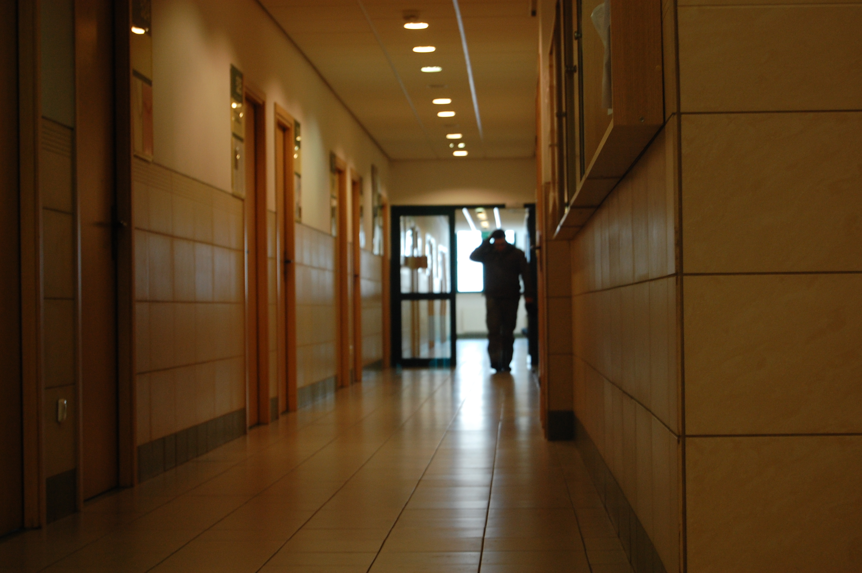 UMCS w Lublinie, Wydział Humanistyczny, V piętro